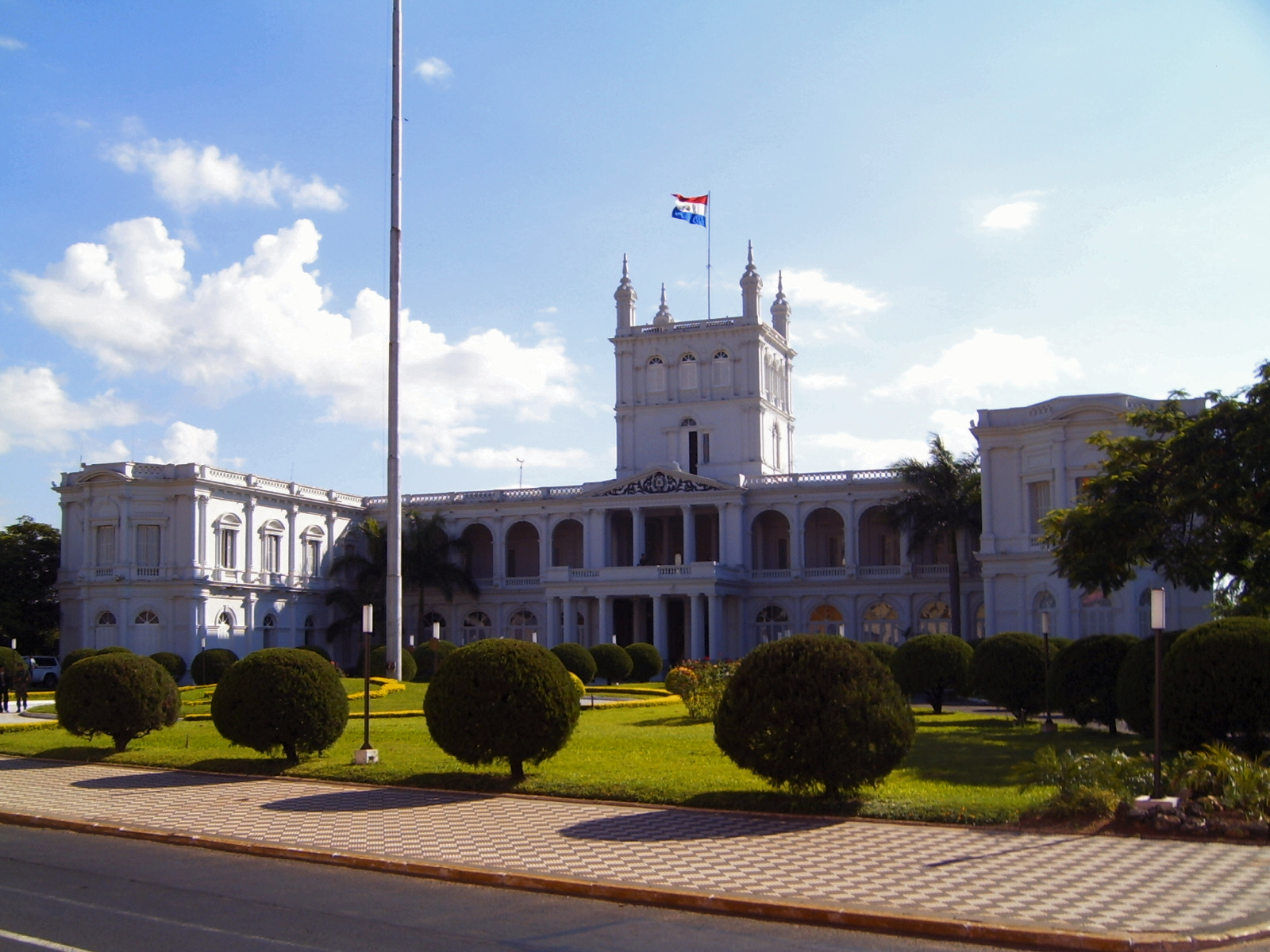 Palacio de Gobierno (también llamado Palacio de López) en Asunción, Paraguay.